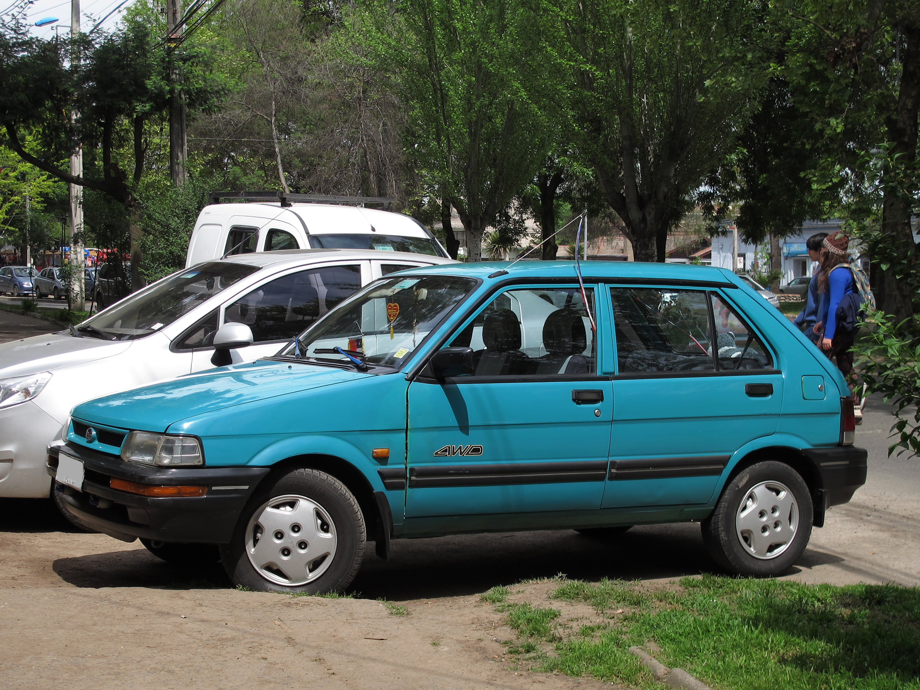 Subaru Justy 1.2 GL-II 4WD 1994